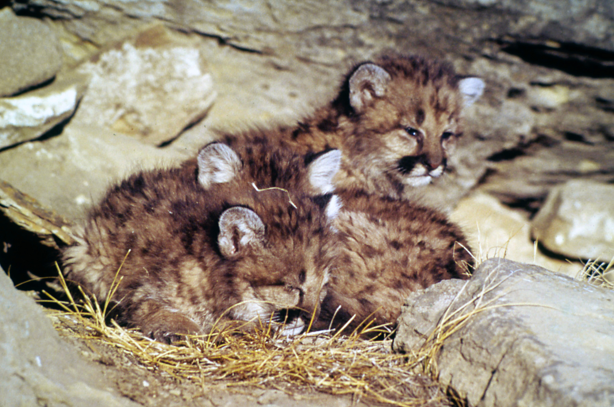 Young mountain lion kittens